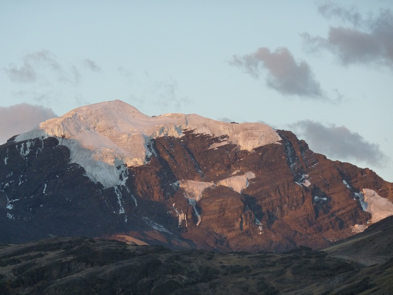 Serkhe Khollu im Abendrot